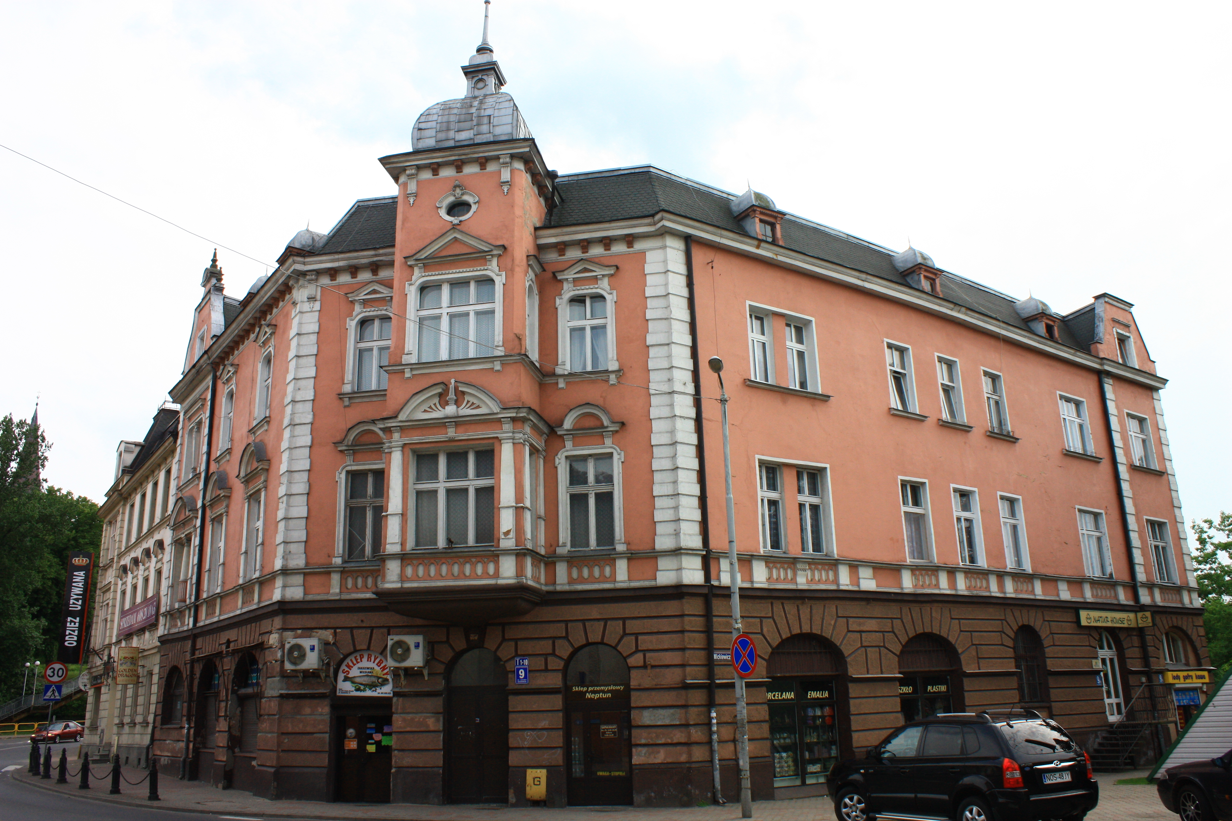 Ostróda, dom, 1896